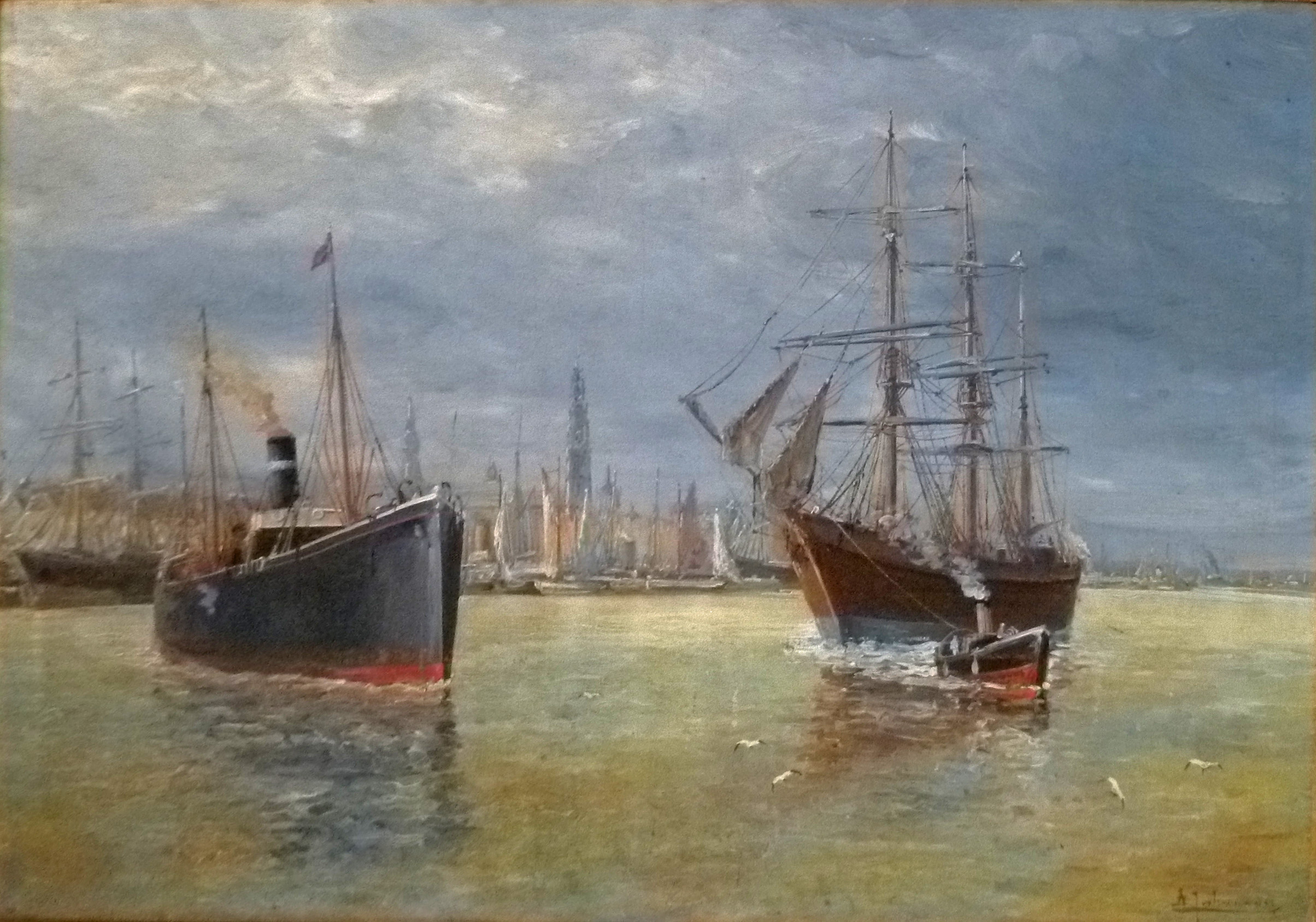 "Haven van Antwerpen", olieverf op doek 65 x 90 cm door de Belgische kunstschilder Albert Jaboneau